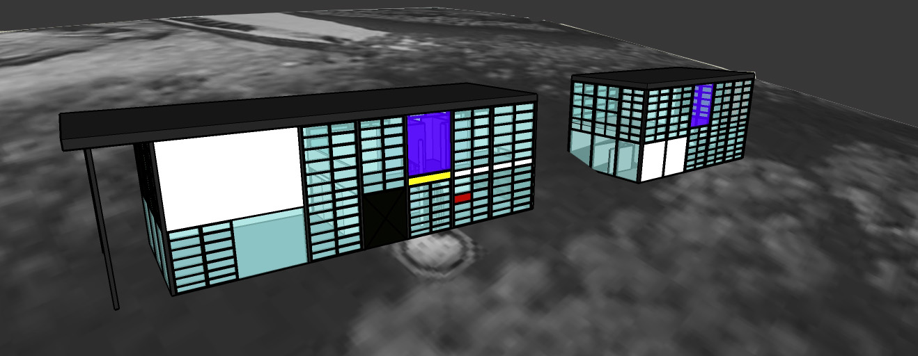 Render con colores